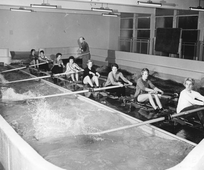 Berlin, TSC Oberschöneweide, Training Zentralbild Wendorf 28.12.1961 Eine junge Sportlerin unserer Republik Die 21jährige Helga Koepnick war bereits mehrfache Jugendmeisterin im Doppel-Vierer und sitzt heute in dem erfolgreichen Achter des TSC Berlin-Oberschöneweide. Der Achter des TSC Oberschöneweide war in den Jahren 1958, 59 und 1960 Deutscher Meister und unterlag im Jahre 1961 nur knapp der DHfK Leipzig. Helga Koepnick ist seit einem Jahr verheiratet und ihr Gatte Kurt ist ebenfalls aktiver Rudersportler dieses Klubs. Beide sind glückliche Besitzer einer neuen AWG-Wohnung in Berlin-Wendenschloß. Helga Koepnick arbeitet im VEB Industrieprojektierung als Sekretärin der Betriebsgewerkschaftsleitung. Als Ausgleichssport treibt die überwiegend Basket- und Handball. Die begabte Leistungssportlerin liest gern Bücher und sorgt mit viel Liebe für das leibliche Wohl der Familie. UBz: Auch im Winter gibt es für die Ruderinnen keinen Stillstand. Die nach den modernsten Gesichtspunkten ausgestattete Kastenruderanlage im Berliner Friesenstadion erlaubt zu jeder Zeit ein intensives Training. Die schönste Kastenruderanlage Europas verfügt noch über Gymnastik-Gewichtheberäume-.